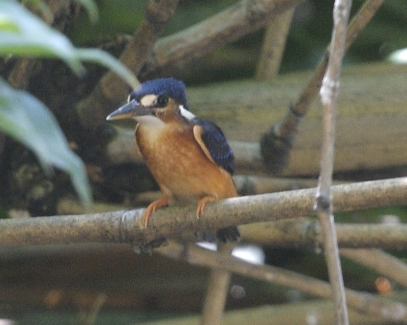 Blue-eared Kingfisher Alcedo meninting Indonesian: Menintin, Raja udang belau, Raja udang meninting, Raja-udang meninting Bogor Botanic Garden, Bogor, Java, Indonesia 20th. October 2008 690V4289